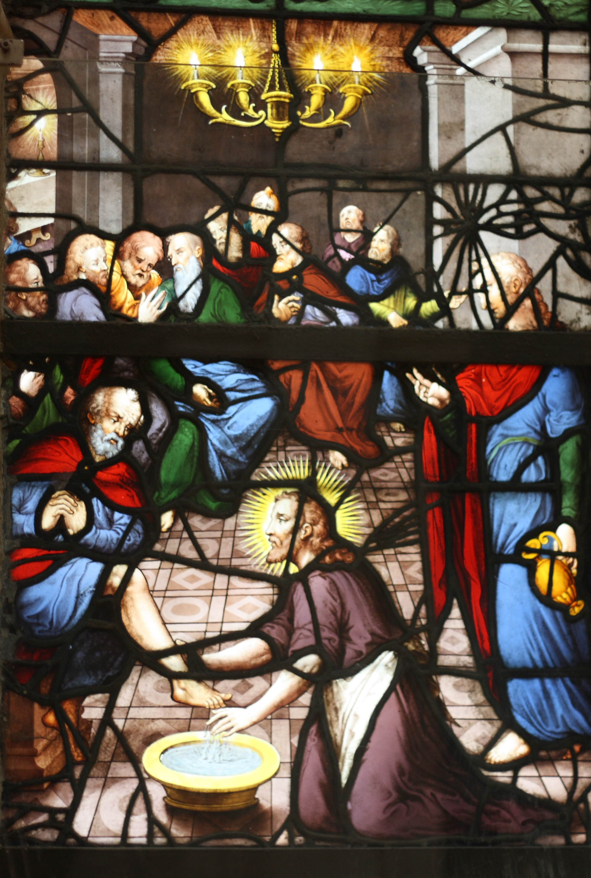 Bleiglasfenster (Ausschnitt) in der "Chapelle des Catéchismes" der Kirche St-Étienne-du-Mont in Paris, Darstellung: Jesus wäscht den Jüngern die Füße